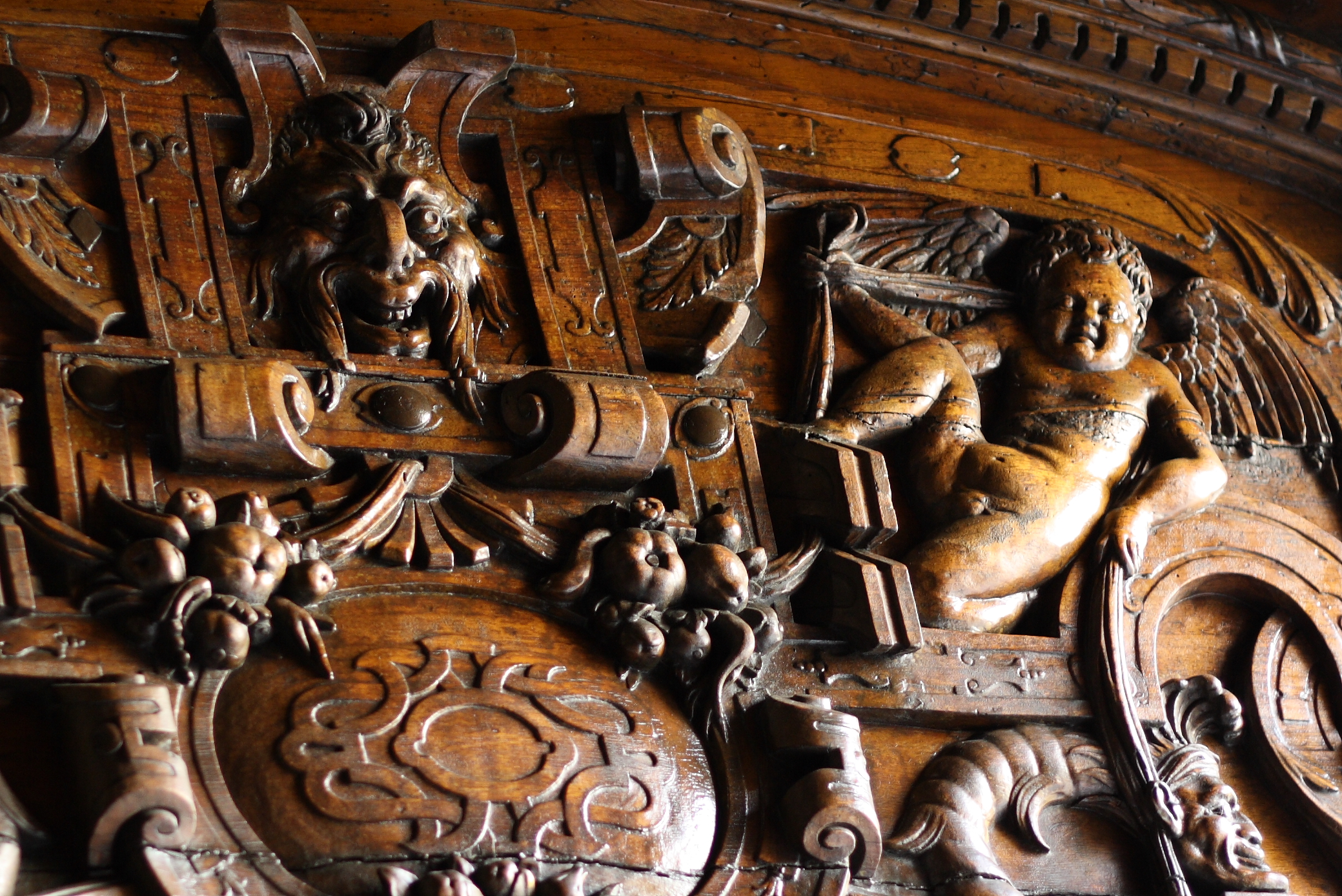 Katholische Kirche Saint-Pierre in Avignon, geschnitztes Portal (Detail) von dem burgundischen Bildhauer Antoine Volard von 1551